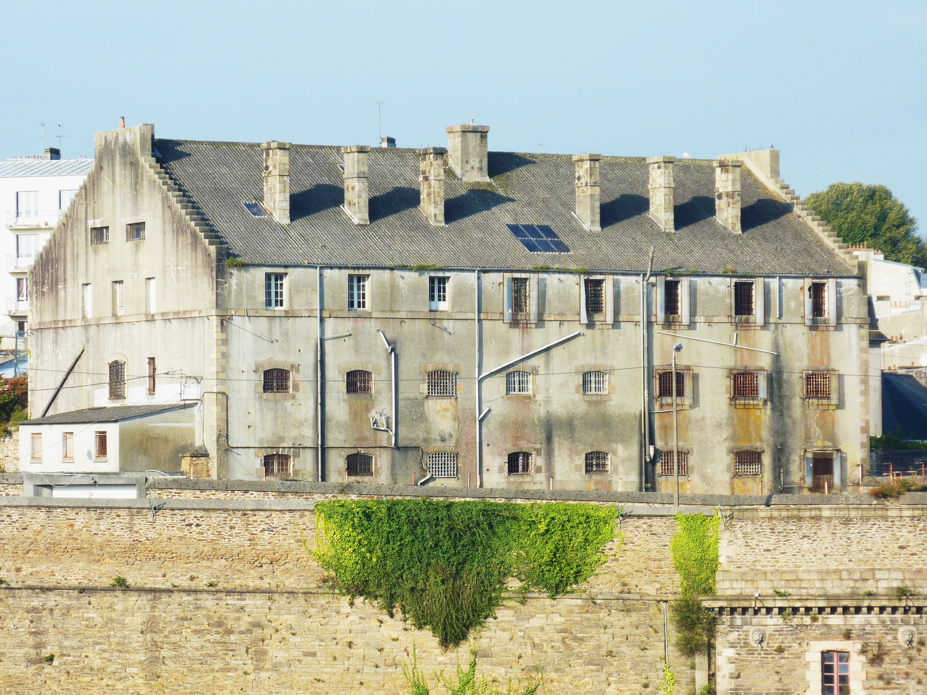 Brest : l'ancienne prison de Pontaniou (désormais fermée)